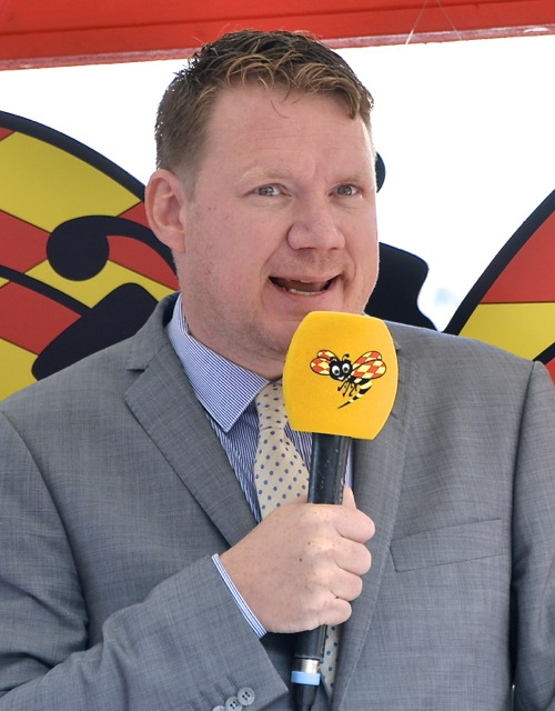 Niklas Svensson på Expressens valscen på Sergels torg i Stockholm den 6 september 2014.